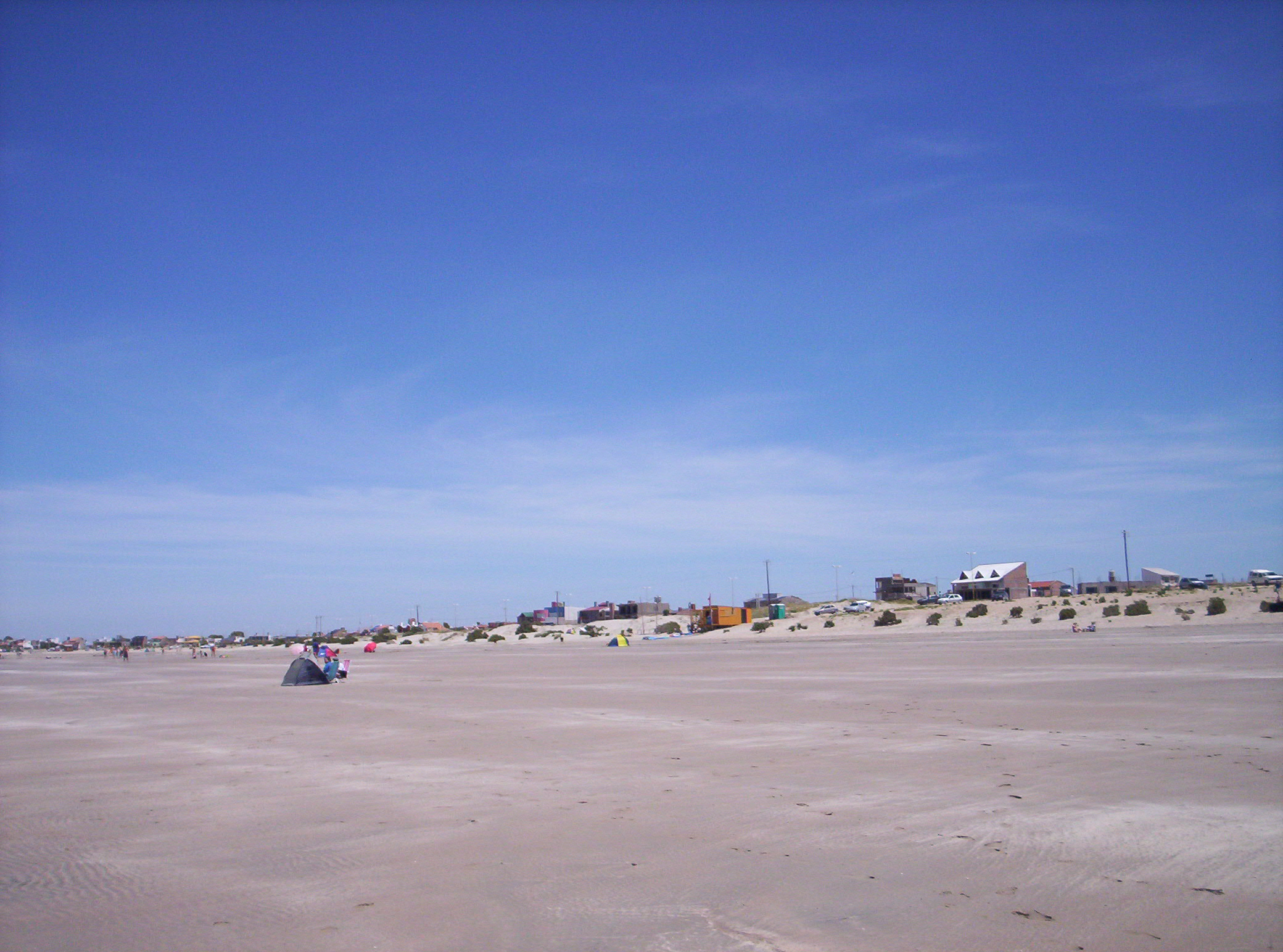 LA VILLA DESDE LA PLAYA